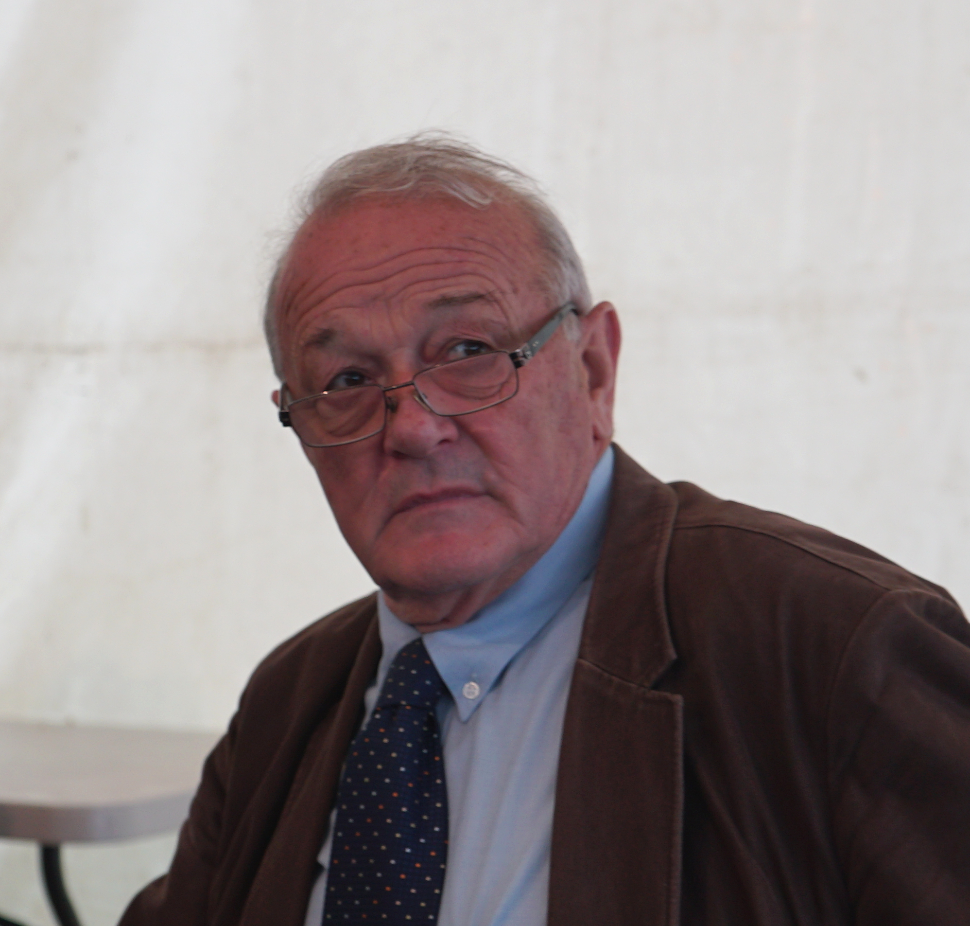 lors de la Fête du livre de Fismes de 2015.